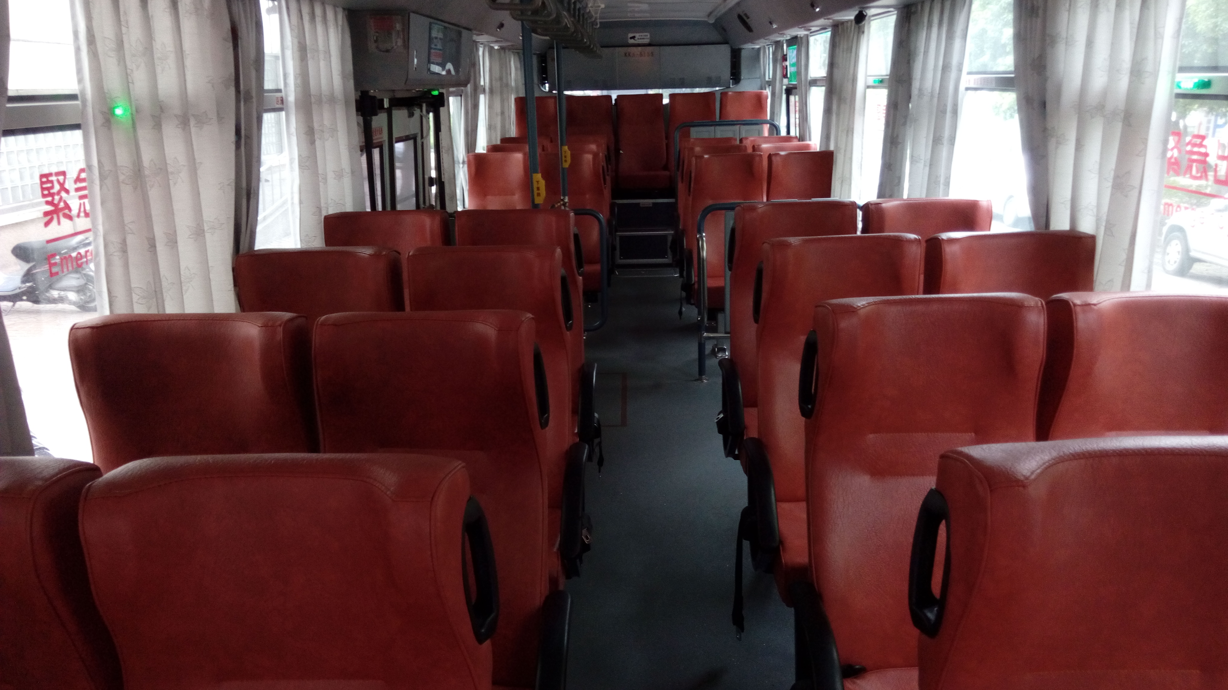 KKA-6155(2016)HINO RK8JRVA-KJF(固亞)(雙門大復康)攝於干城站附近 2017-09-07 07:43:23